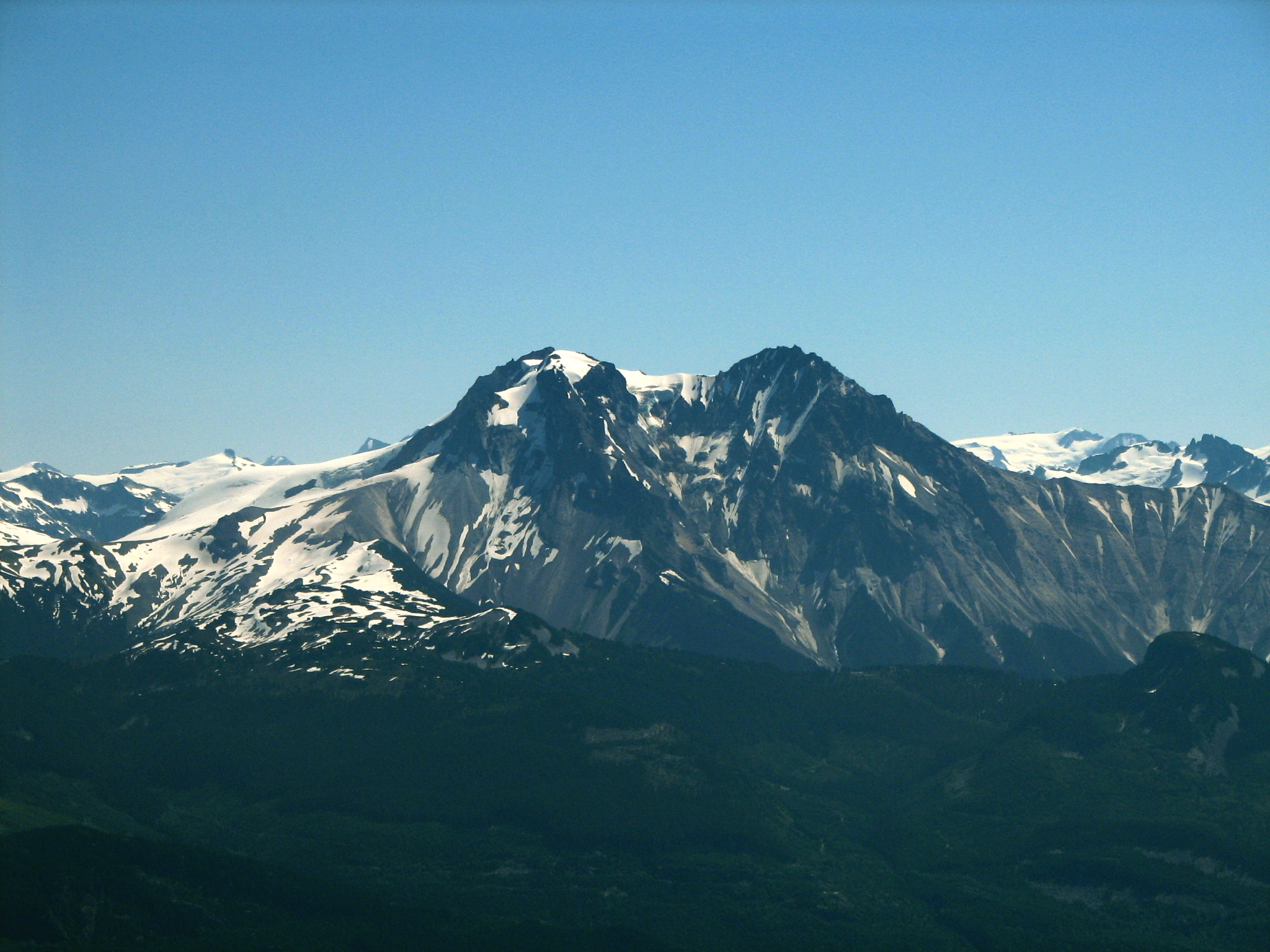 Mount Garibaldi close up from Tantalus